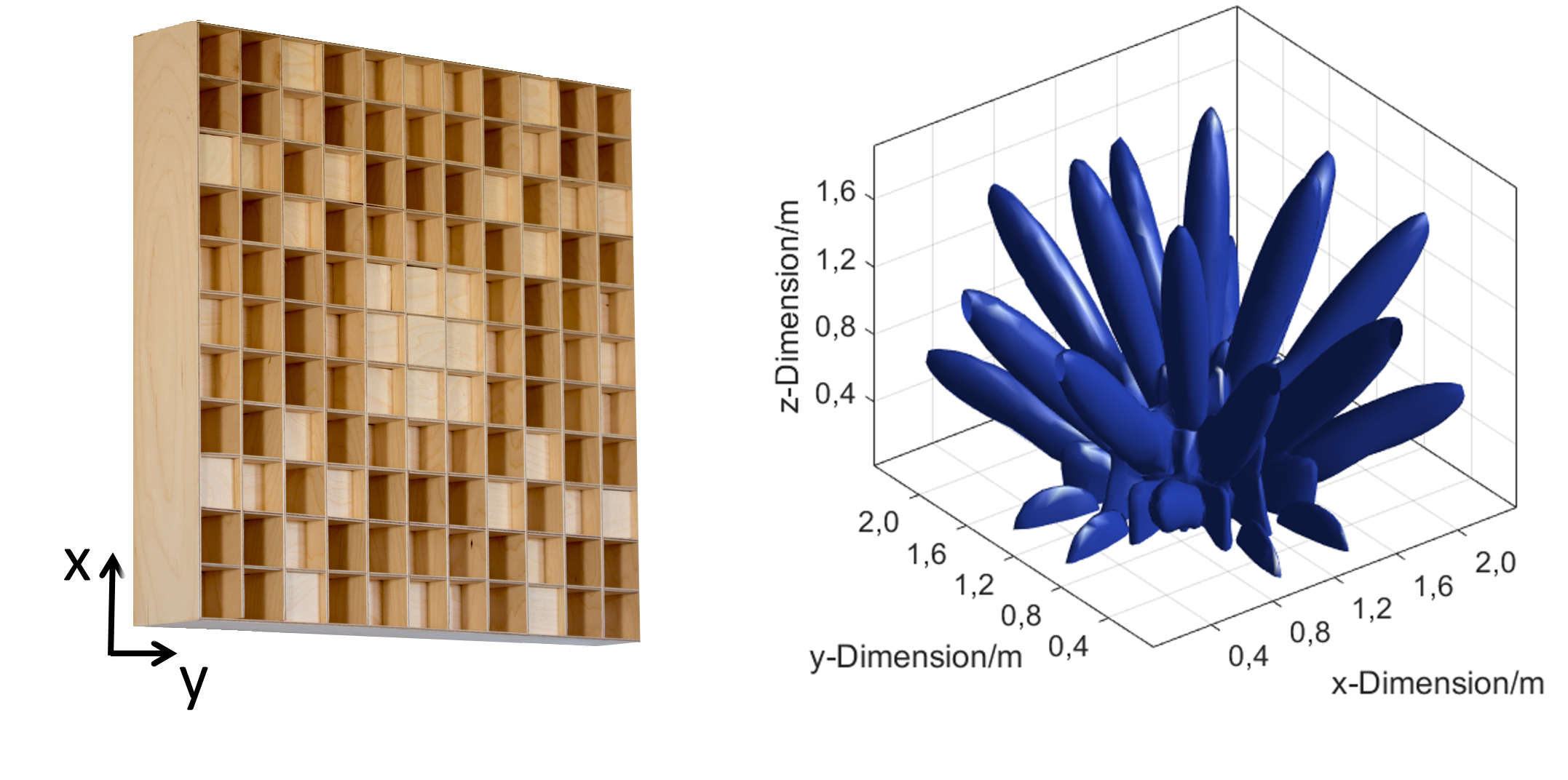 Zweidimensionaler Diffusor und simulierte, dreidimensionale Schalldruckverteilung beim Vielfachen der Designfrequenz.